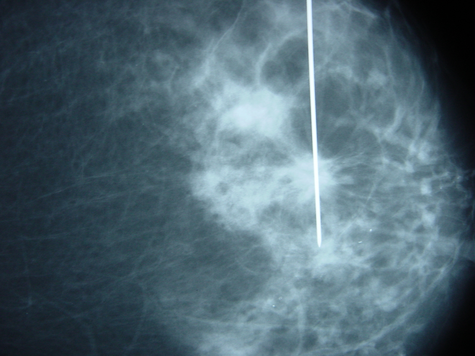 Mammographie du sein féminin. Pose d'un "harpon" en vue d'une biopsie stéréotaxique. Auteur : Raziel 13 juin 2006 à 21:36 (CEST) Date de prise : Mars 2006